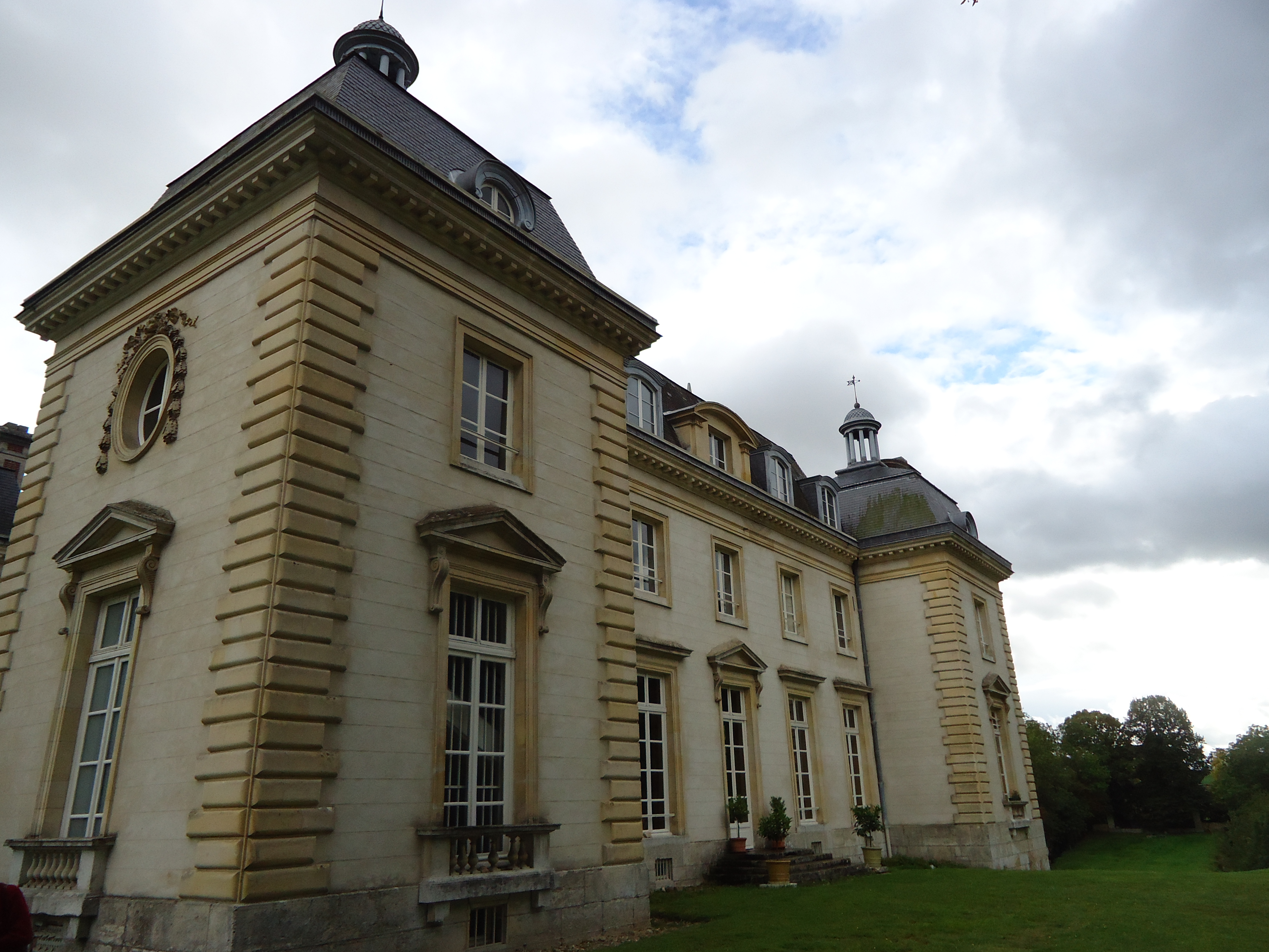 Saint-Aquilin de Pacy - Chateau du Buisson de Mai (XVIIIe)